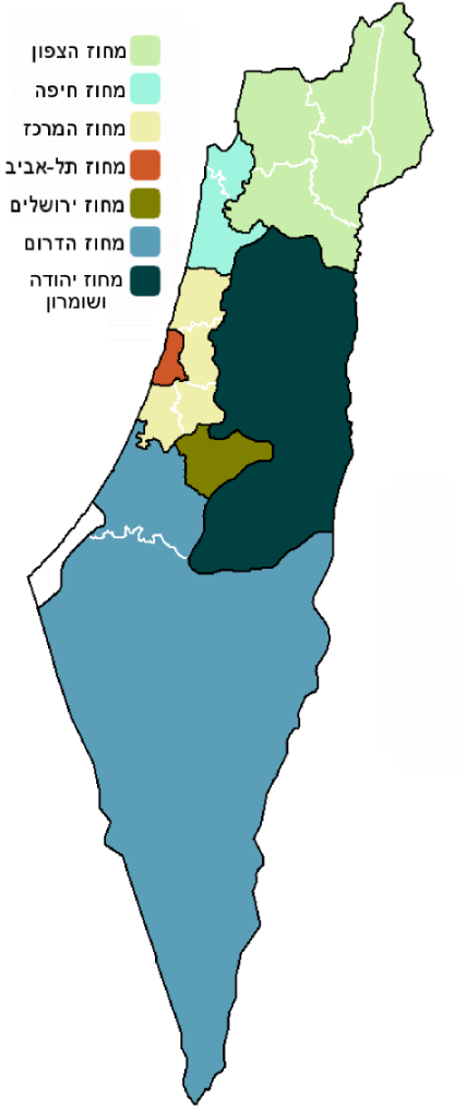 מחוזות ישראל